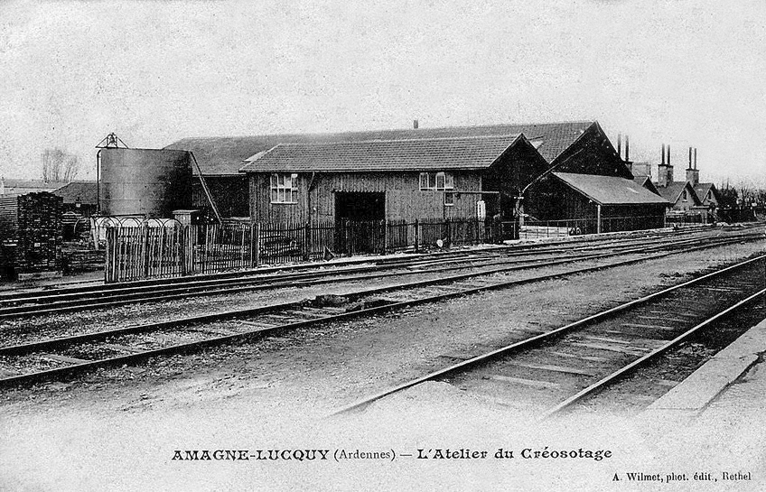 L'atelier de Créosotage de la compagnie des chemins de fer de l'Est, à côté de la gare d'Amagne-Lucquy